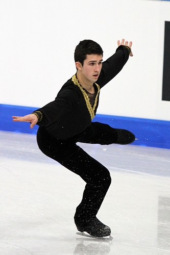 Лиам Фирас (Канада) на чемпионате мира по фигурному катанию среди юниоров 2012